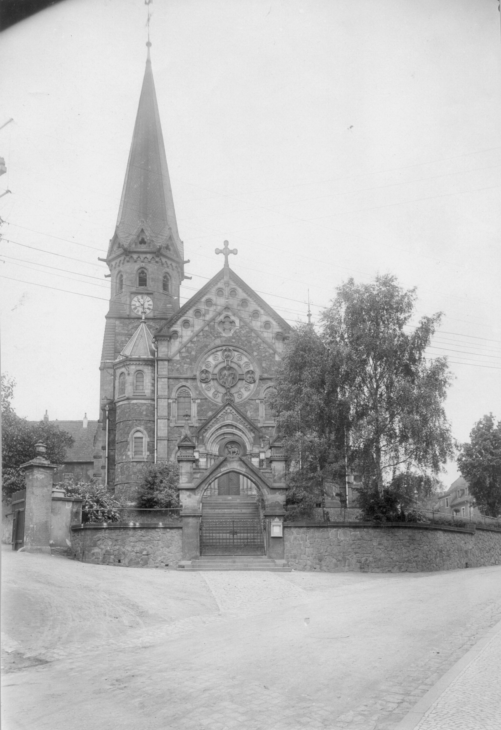 Döhlen (Freital-Döhlen). Lutherkirche (1881/1882; G. L. Möckel). Ansicht von Osten